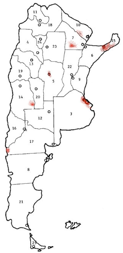 Мапа розповсюдження українців в Аргентині